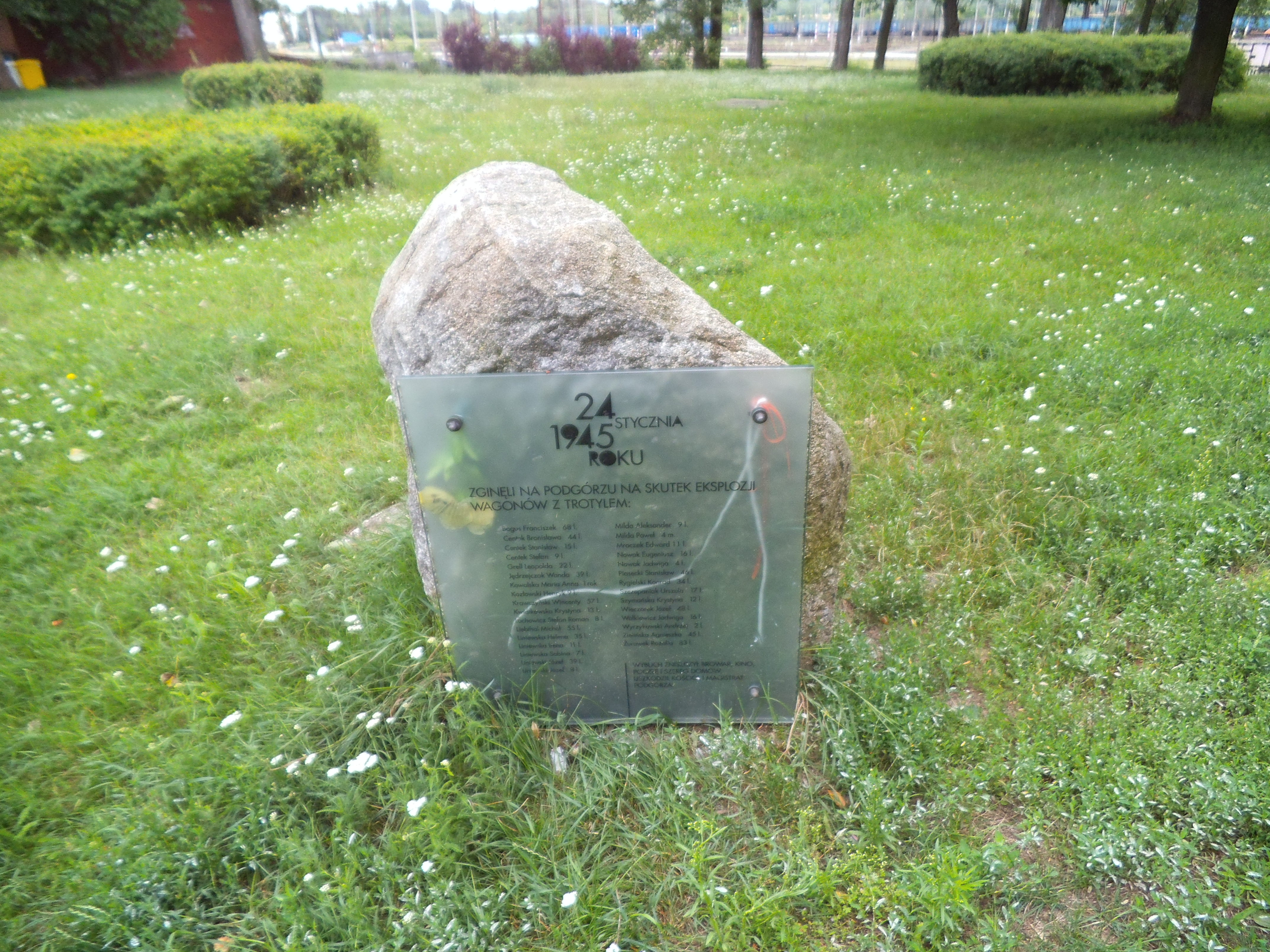 Kamień z tablicą poświęconą mieszkańcom Podgórza, którzy zginęli w wybuchu w styczniu 1945 roku